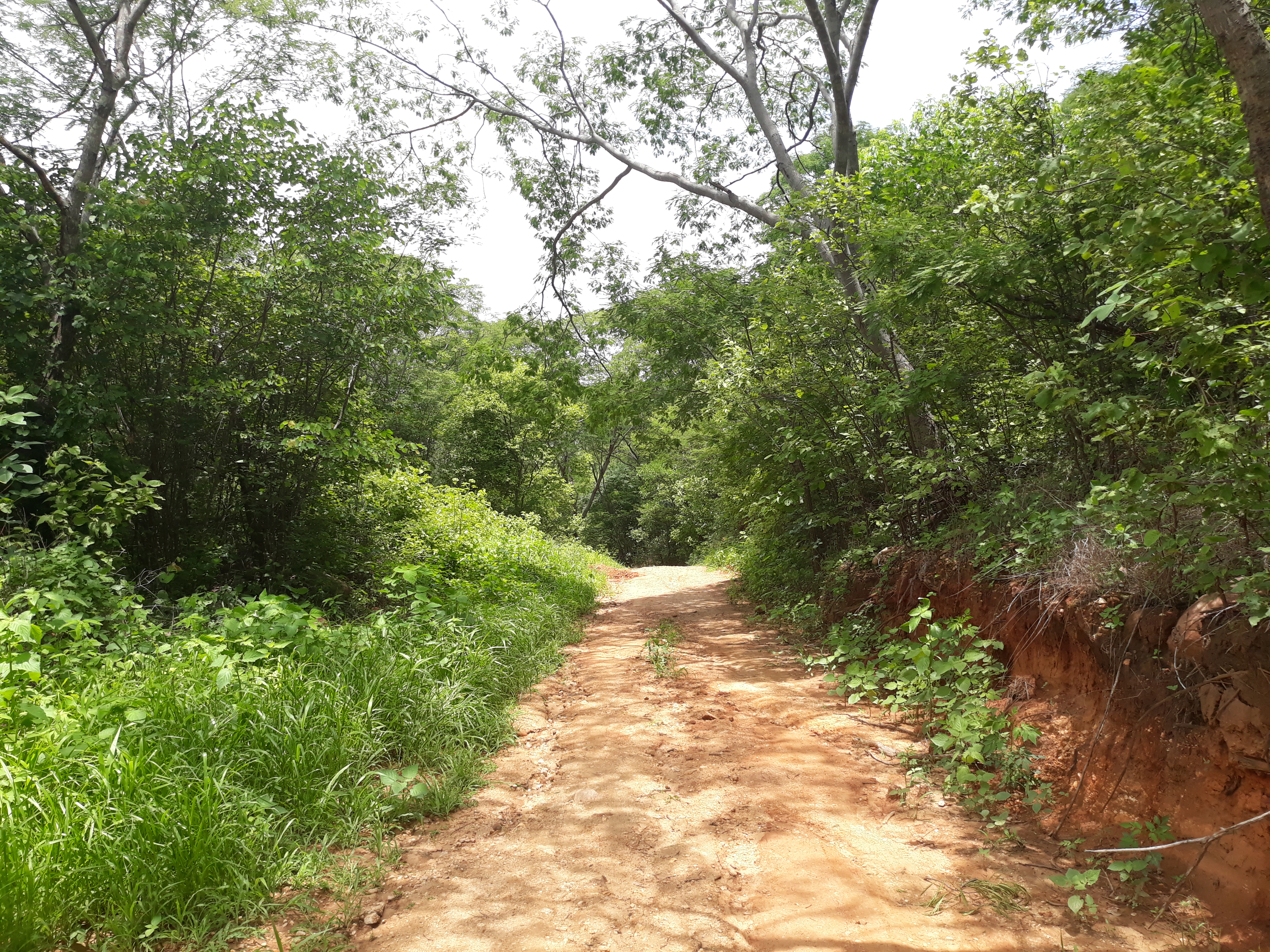 Caatinga hiperxerófila, vegetação típica do Sertão nordestino, no serrote de São João Batista, município de Encanto, Rio Grande do Norte, Brasil